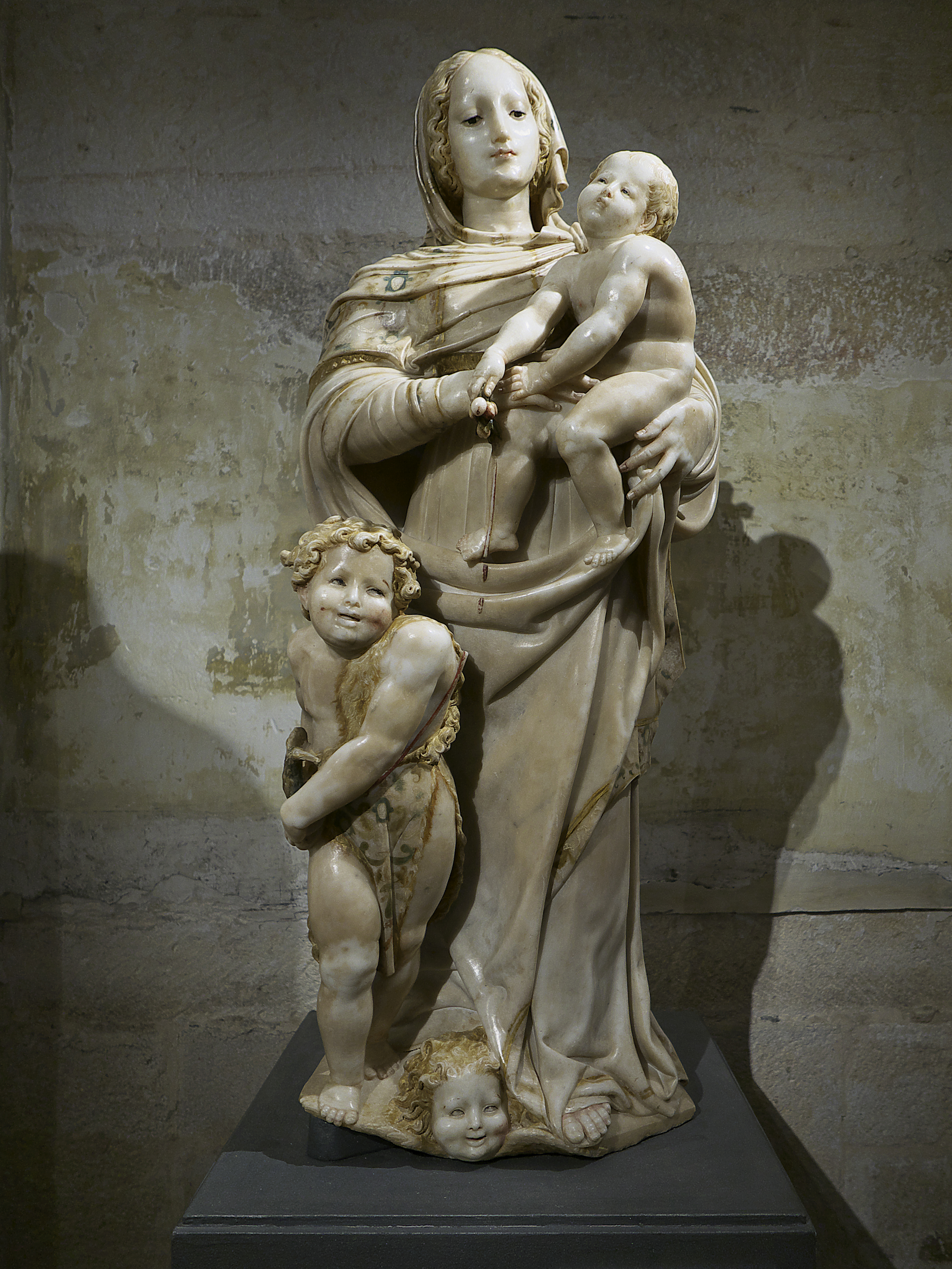 Catedral de Zamora. Grupo de Bartolomé Ordoñez (1520), mármol de Carrara ligeramente policromado. Procede del Monasterio de San Jerónimo (Zamora).